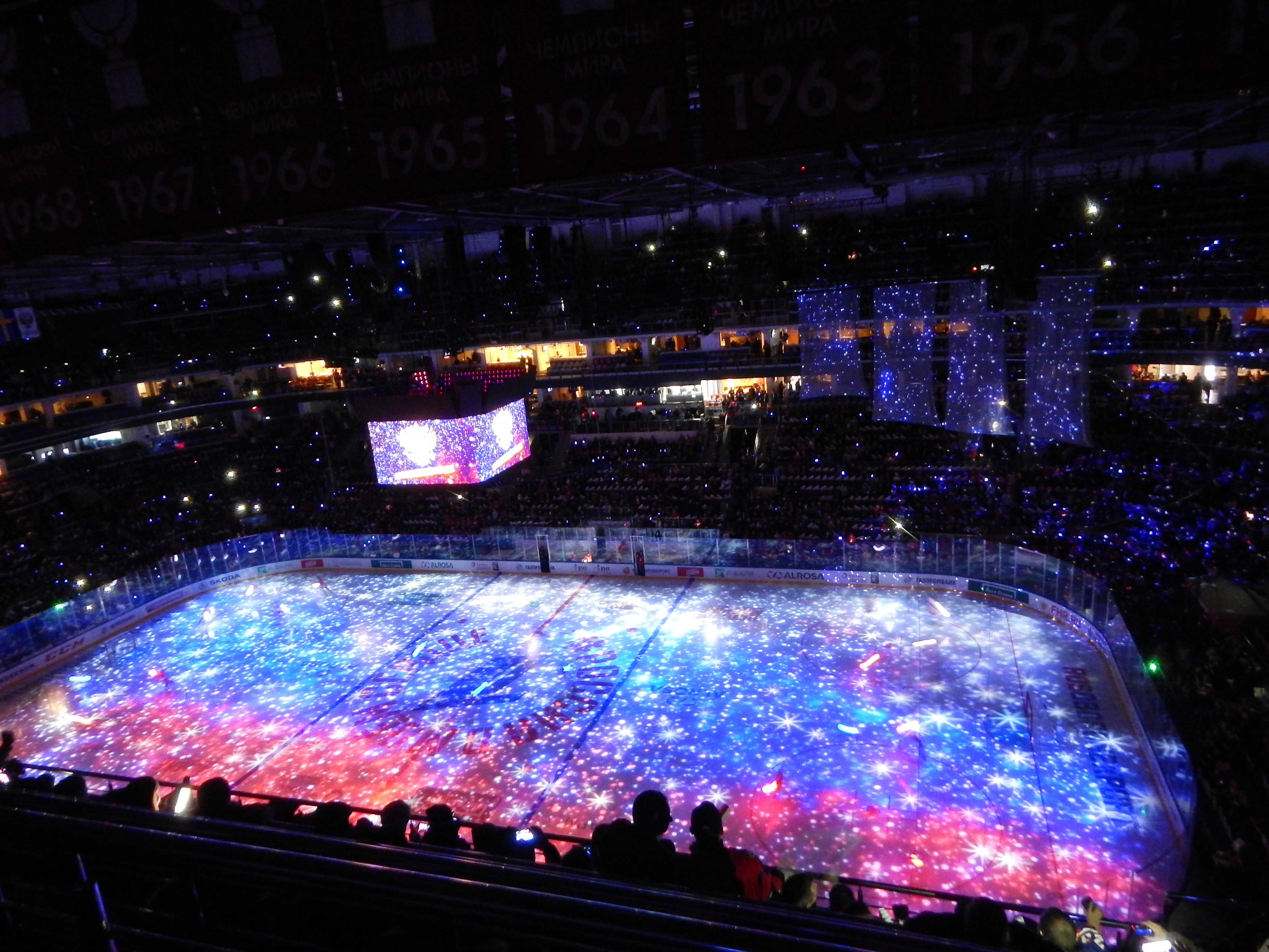 Кубок Первого Канала 2017, матч Россия - Канада (16 декабря 2017)